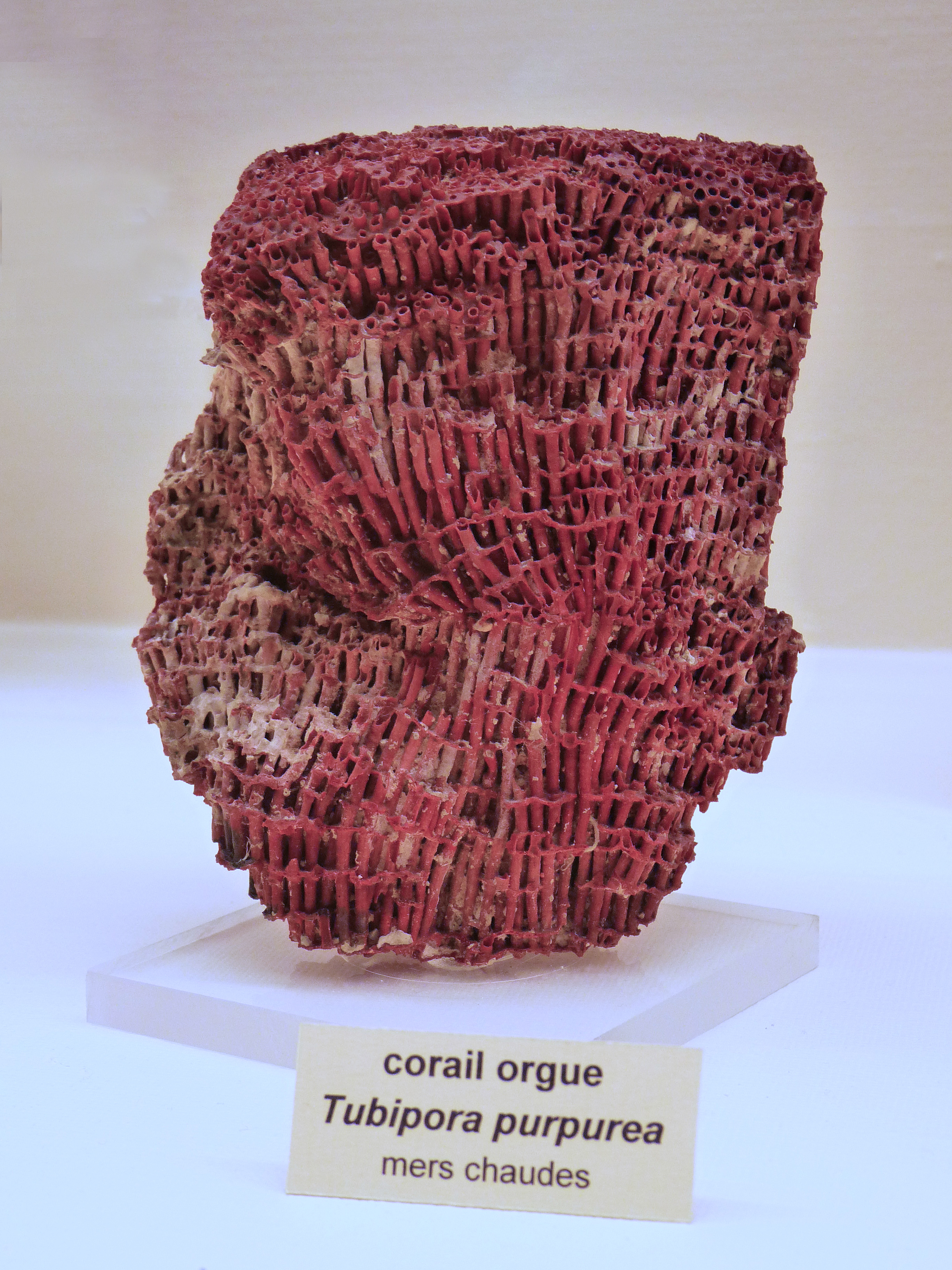 Corail orgue, Tubipora purpurea (ou Tubipora musica) au Musée zoologique de Strasbourg